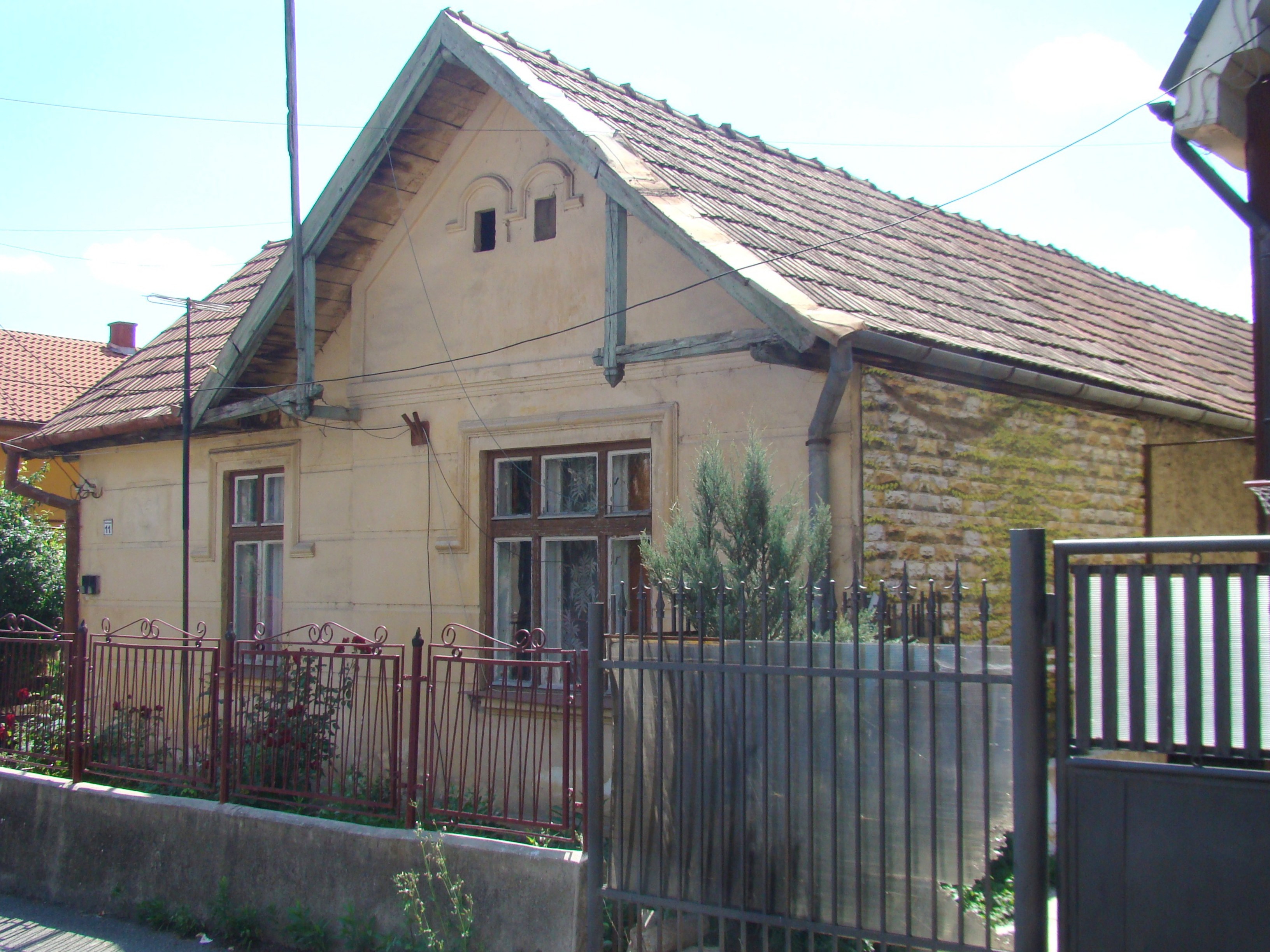 Clădire monument istoric, str. Jean Jaures, nr.11 (Casa în care a trăit Józsa Béla)